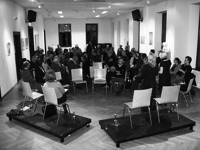 Este LEADER-Kulturkonferenz, 29. Jänner 2009, Gleisdorf